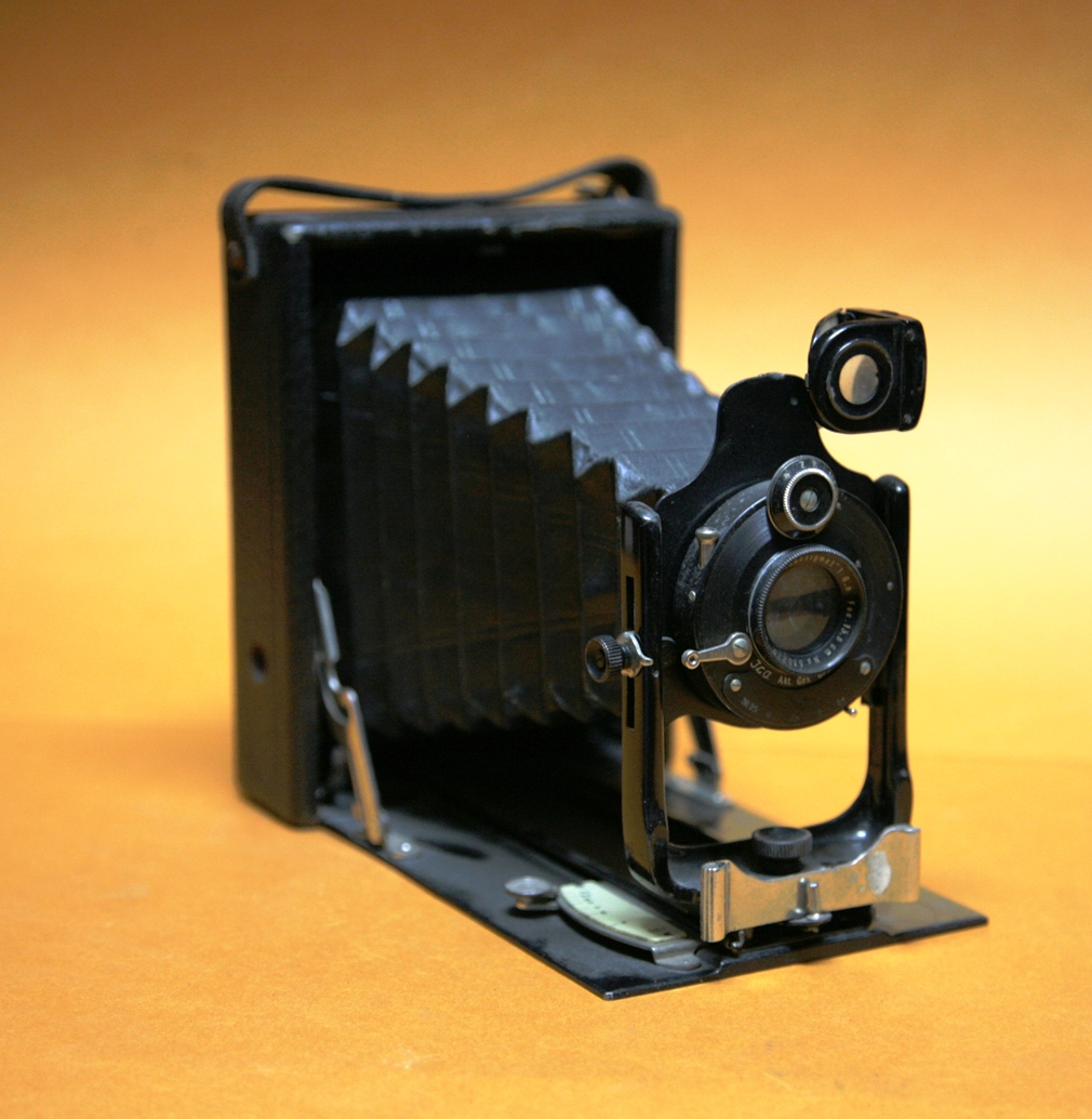 Coll. Marcè CL - Internationale Camera AG (ICA) mod. Lola 1912-14[1]